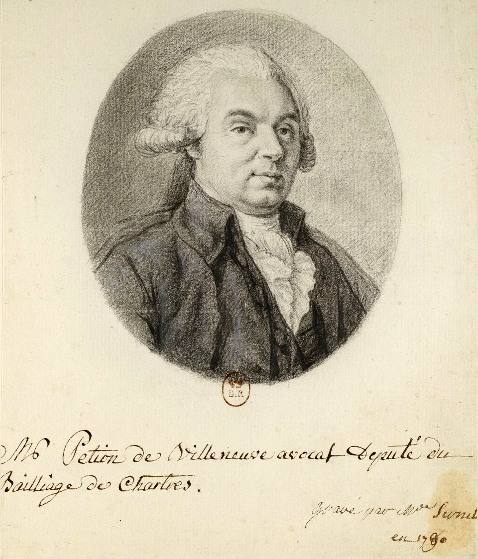 Mr Petion de Villeneuve : avocat, deputé du bailliage de Chartres, dessin au crayon noir.